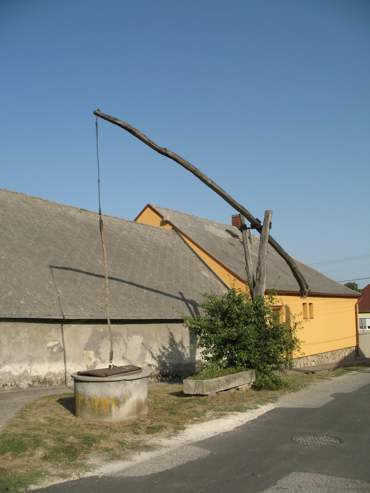 Öcs falu